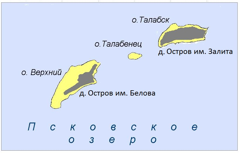 Талабские острова в Псковском озере